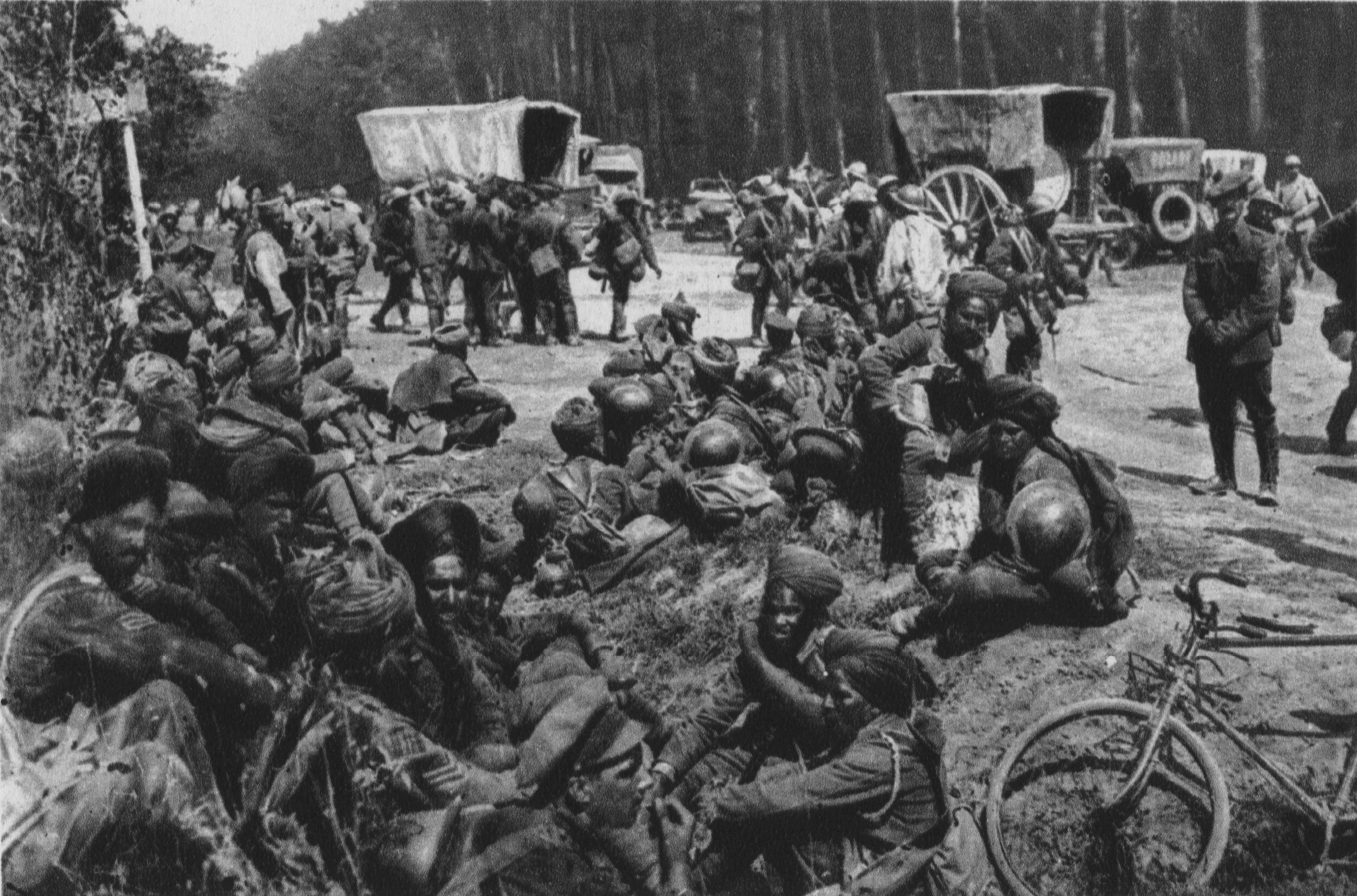 Im Walde von Villers-Cotterets (Aisne). Foch hatte hier den Grossteil seiner Hauptreserven, bestehend aus französischen, englischen und amerikanischen Truppen gesammelt. Am 18. Juli 1918 griff er die 7. deutsche Armee überfallartig und konzentrisch von drei Seiten an. Das Bild zeigt eine Abteilung Hindus.